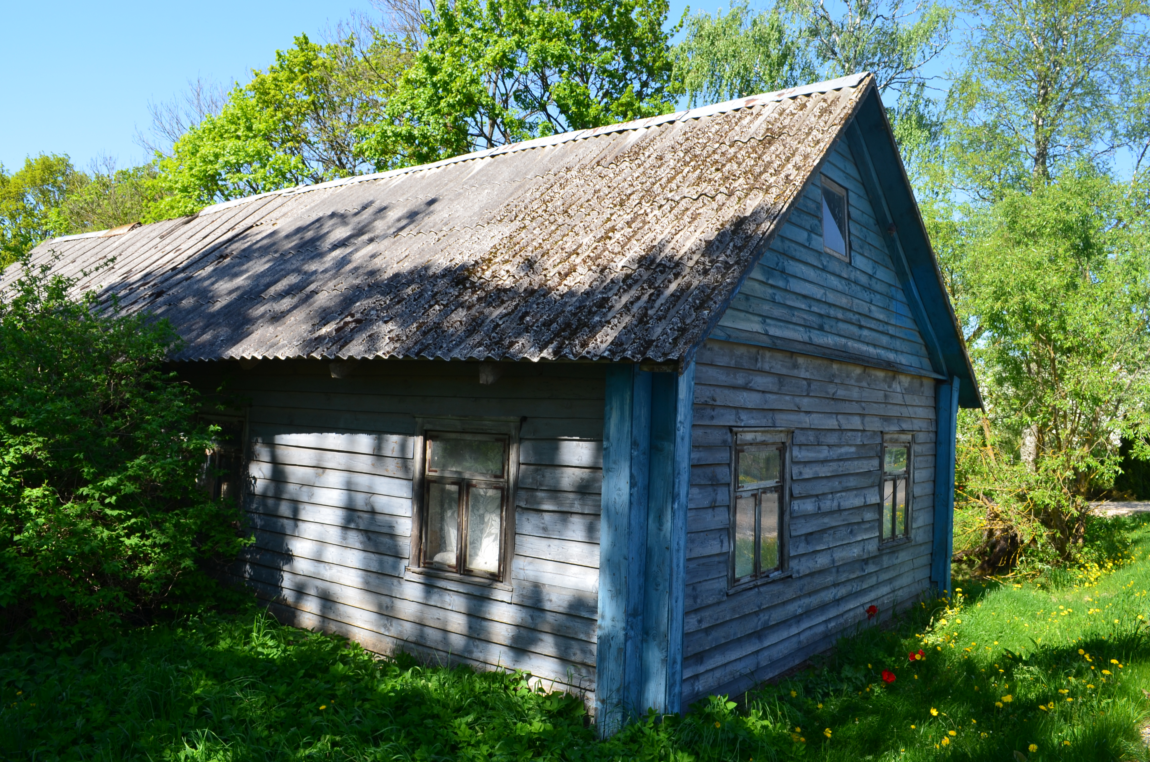 Pravydžiai, Kavarsko sen., Anykščių raj.